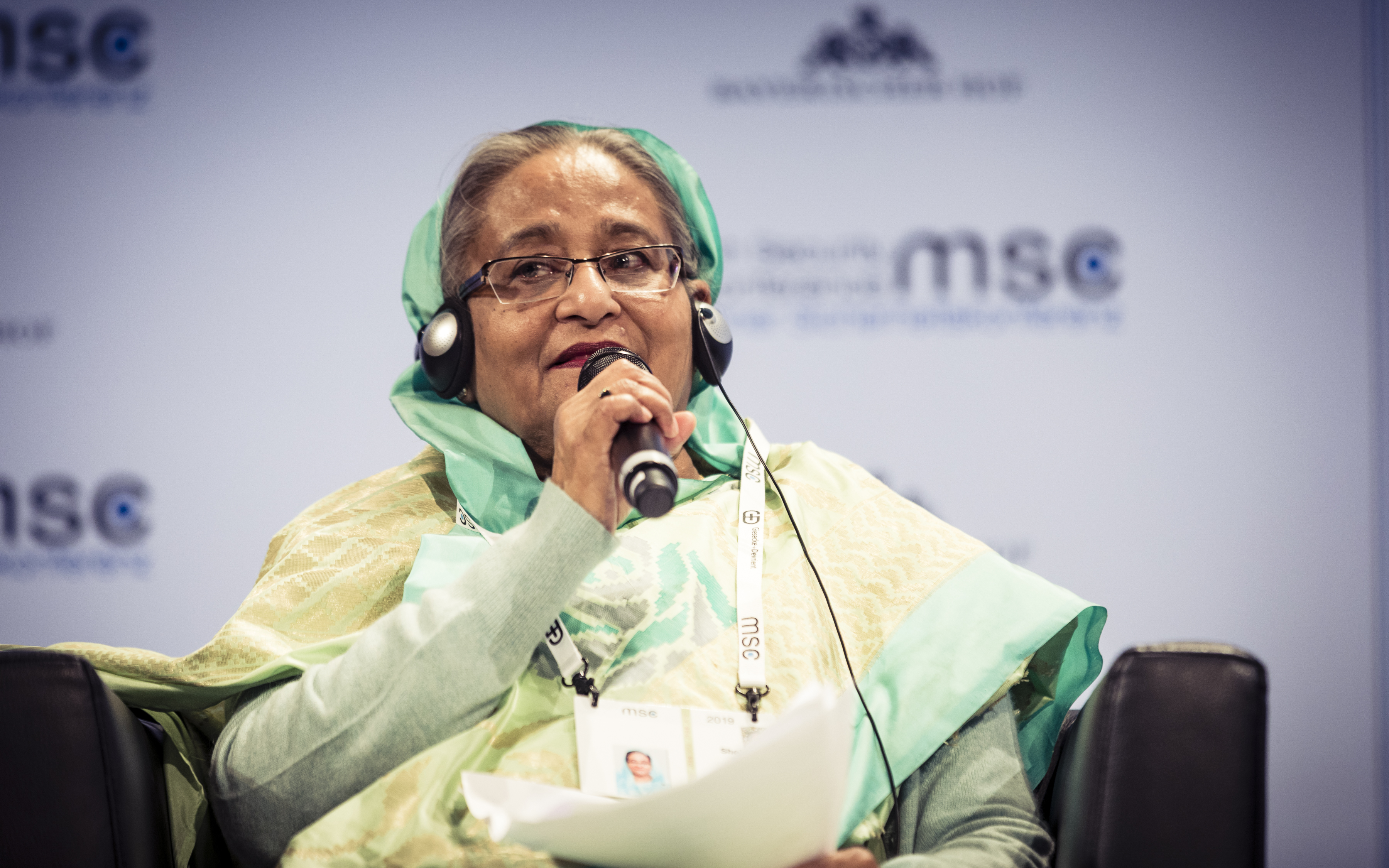 Sheikh Hasina während der Münchener Sicherheitskonferenz 2019